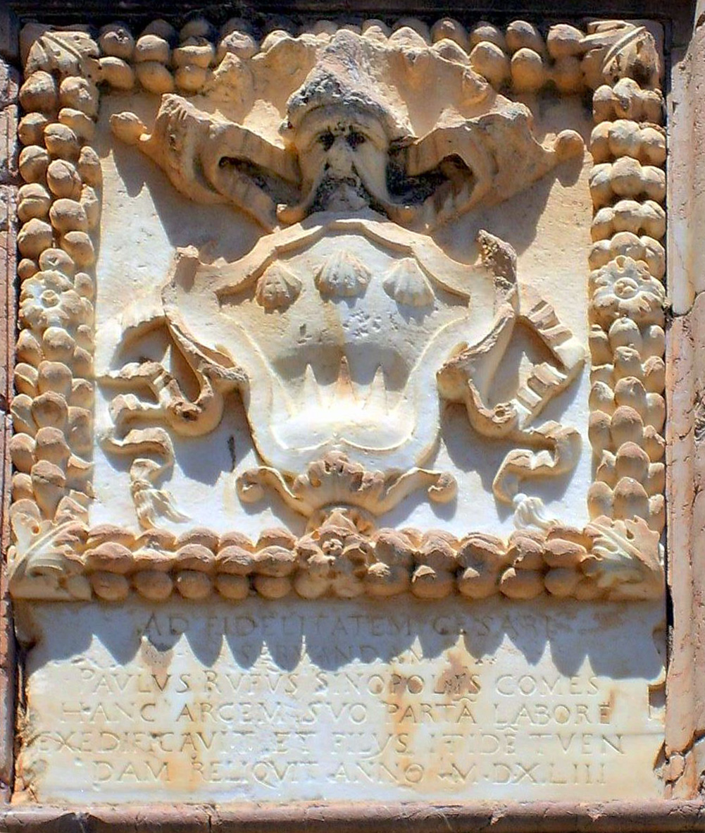 Castello Ruffo di Scilla, 20 km da Reggio Calabria, particolare dello stemma dei Ruffo e della lapide con iscrizione all'ingresso